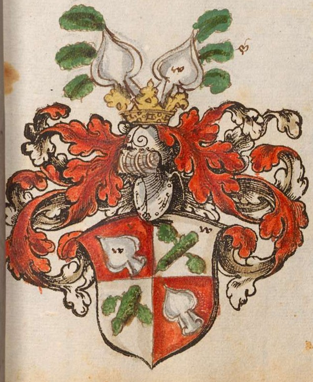 Wappenbuch des Heiligen Römischen Reiches - BSB Cod.icon. 390 Nürnberg um 1554 - 1568